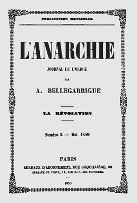 L'Anarchie, journal de l'ordre, n°2, édité par Anselme Bellegarrigue, 1850.